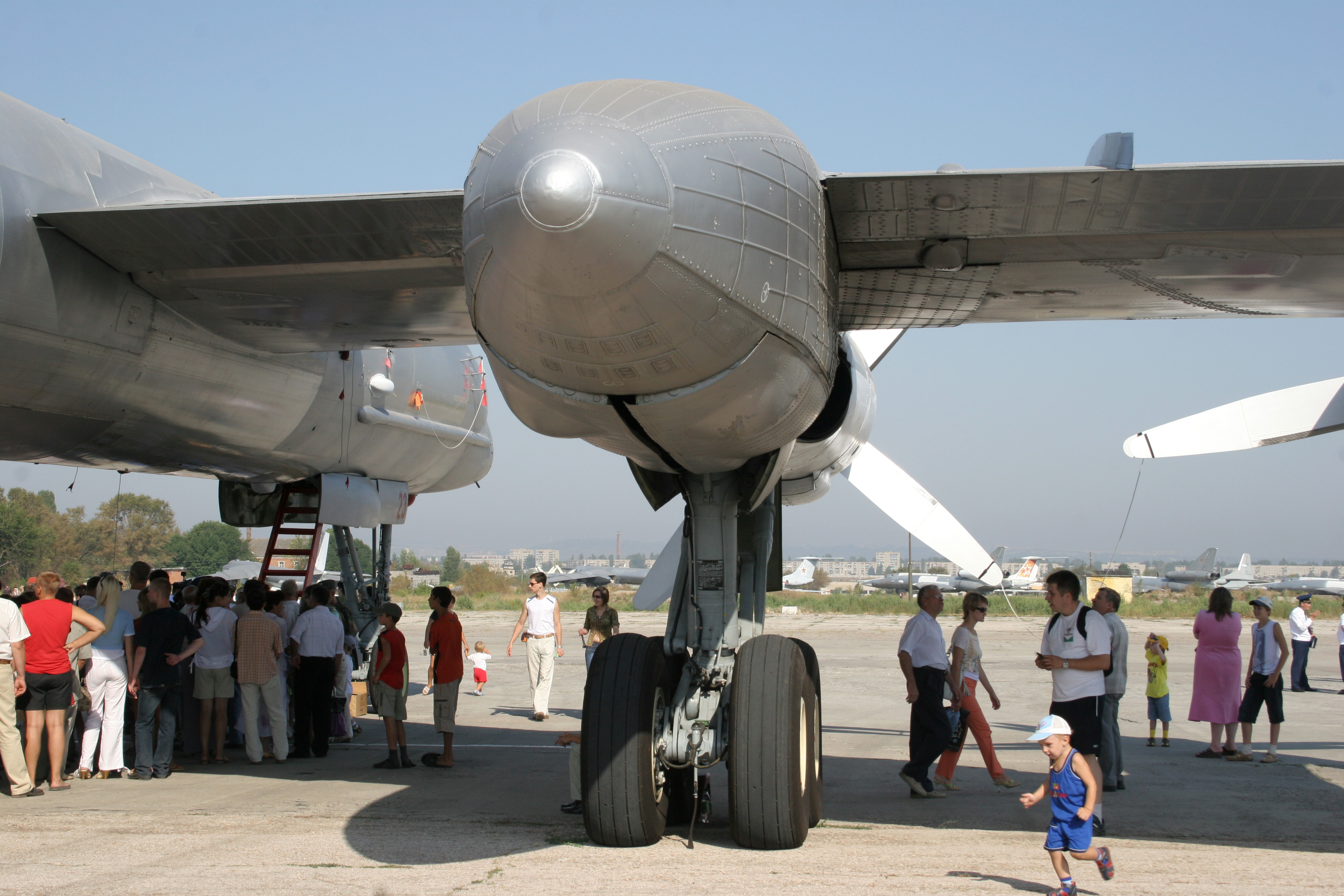 Самолёт Ту-95 бортовой номер 23. Мотогондола правая стойки шасси